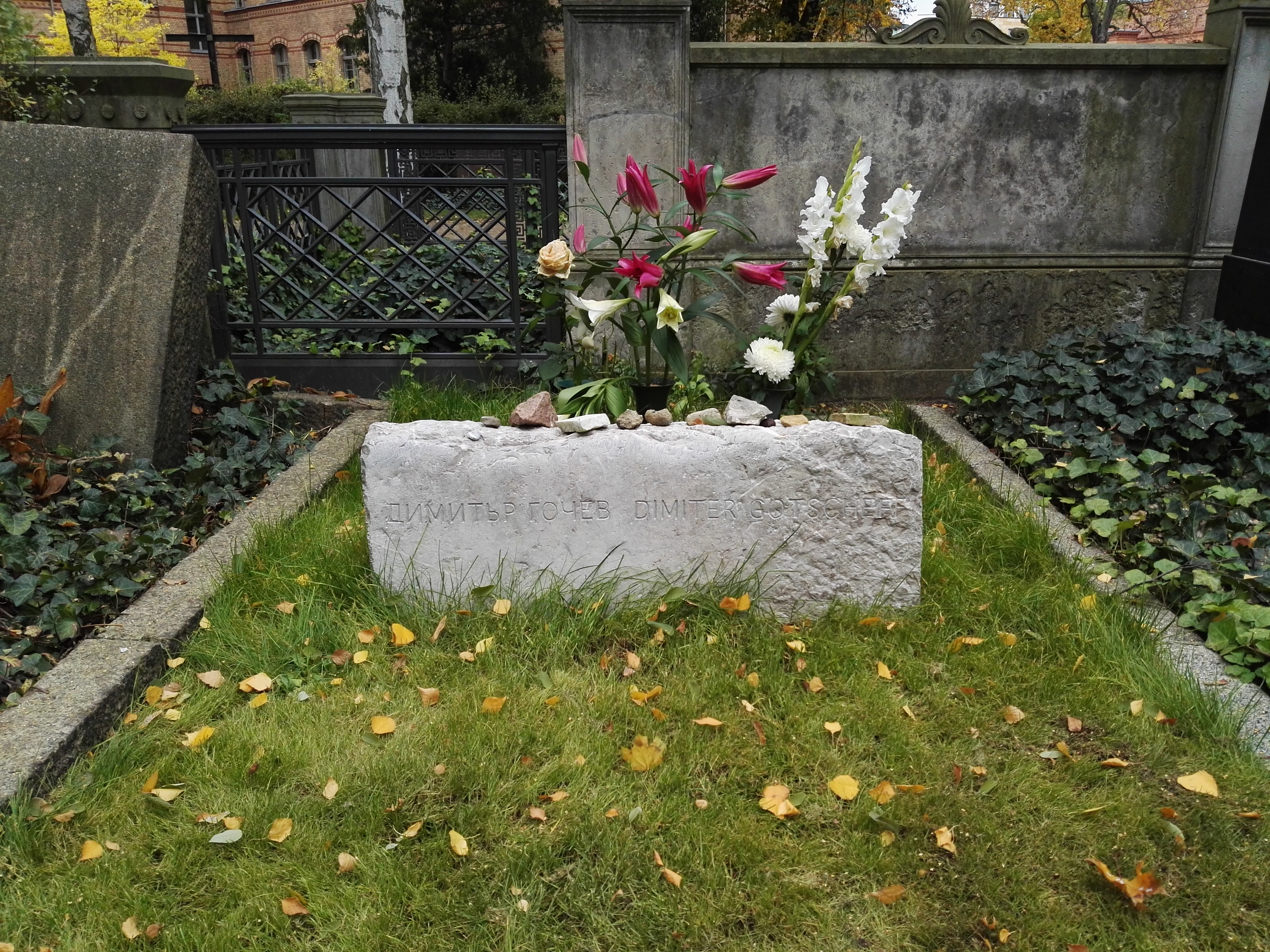 Grab von Dimiter Gotscheff auf dem Friedhof der Dorotheenstädtischen und Friedrichswerderschen Gemeinden in Berlin-Mitte